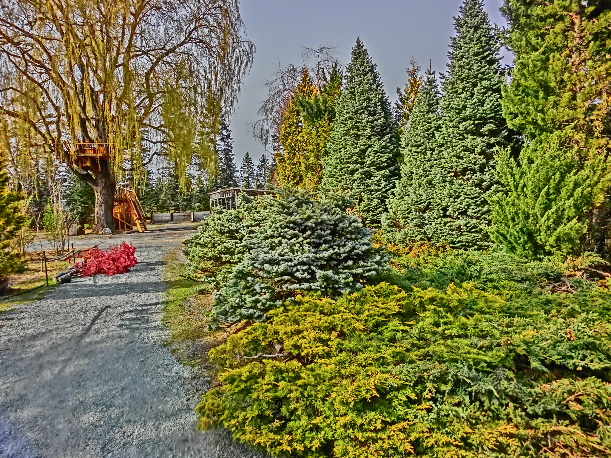 帯広市 真鍋農園